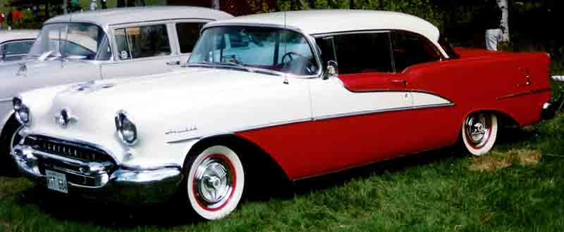 1955 Oldsmobile 88 Holiday